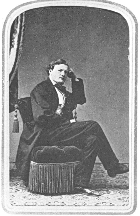 Paul Sinner, 1864, Atelier Johann Bleibel, Visitkartenformat